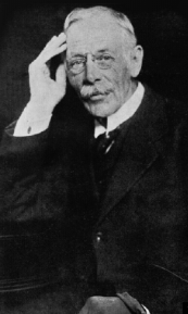 Residen British yang pertama di kawasan Tempasuk iaitu William Pretyman